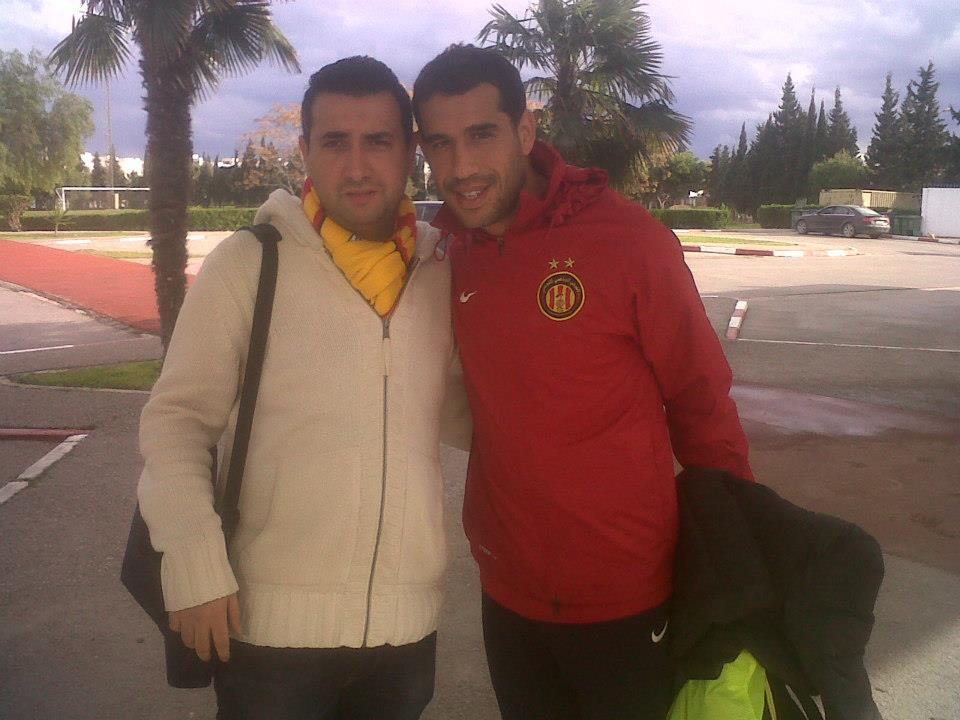 Sameh Derbali avec l'un de ses fans